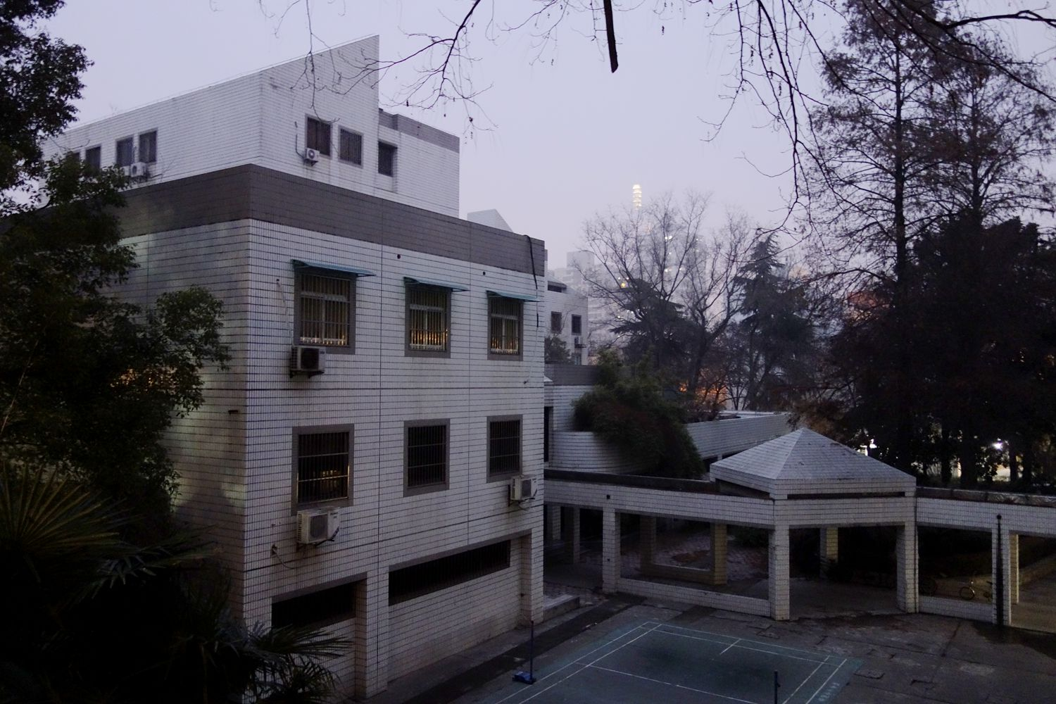 中文（中国大陆）: 南京师范大学 随园校区 逸夫教育馆